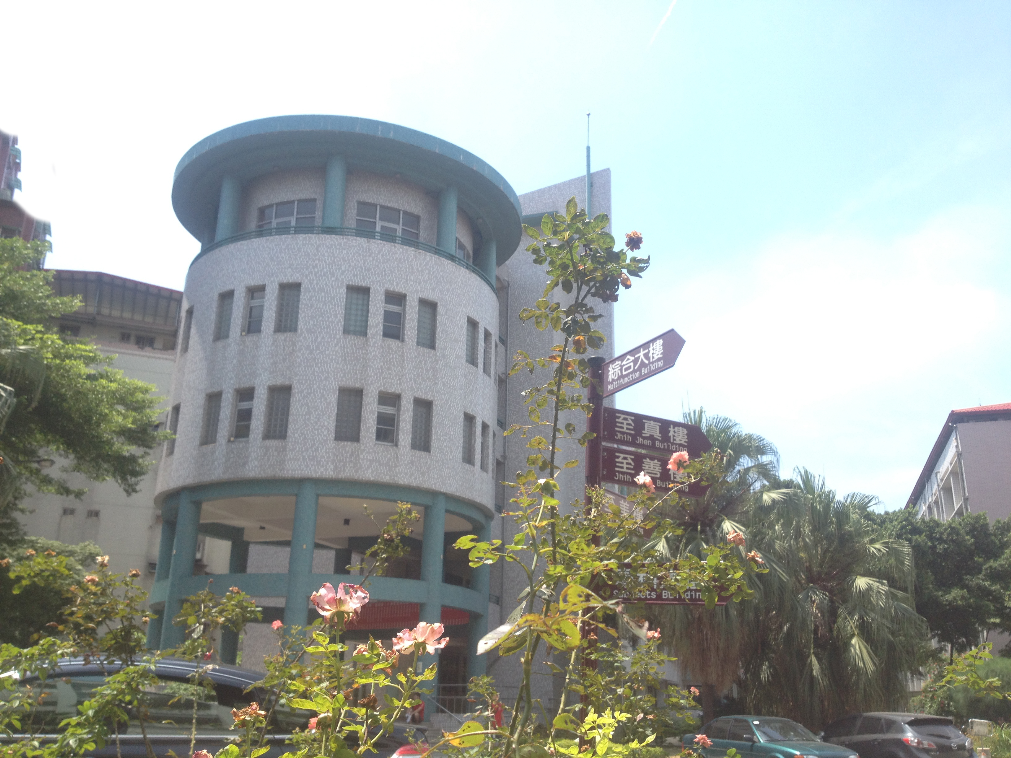 中文（台灣）: 新北市立三重高級中學至聖樓